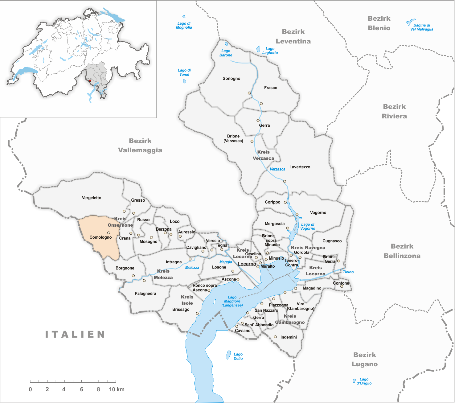 Municipality Comologno